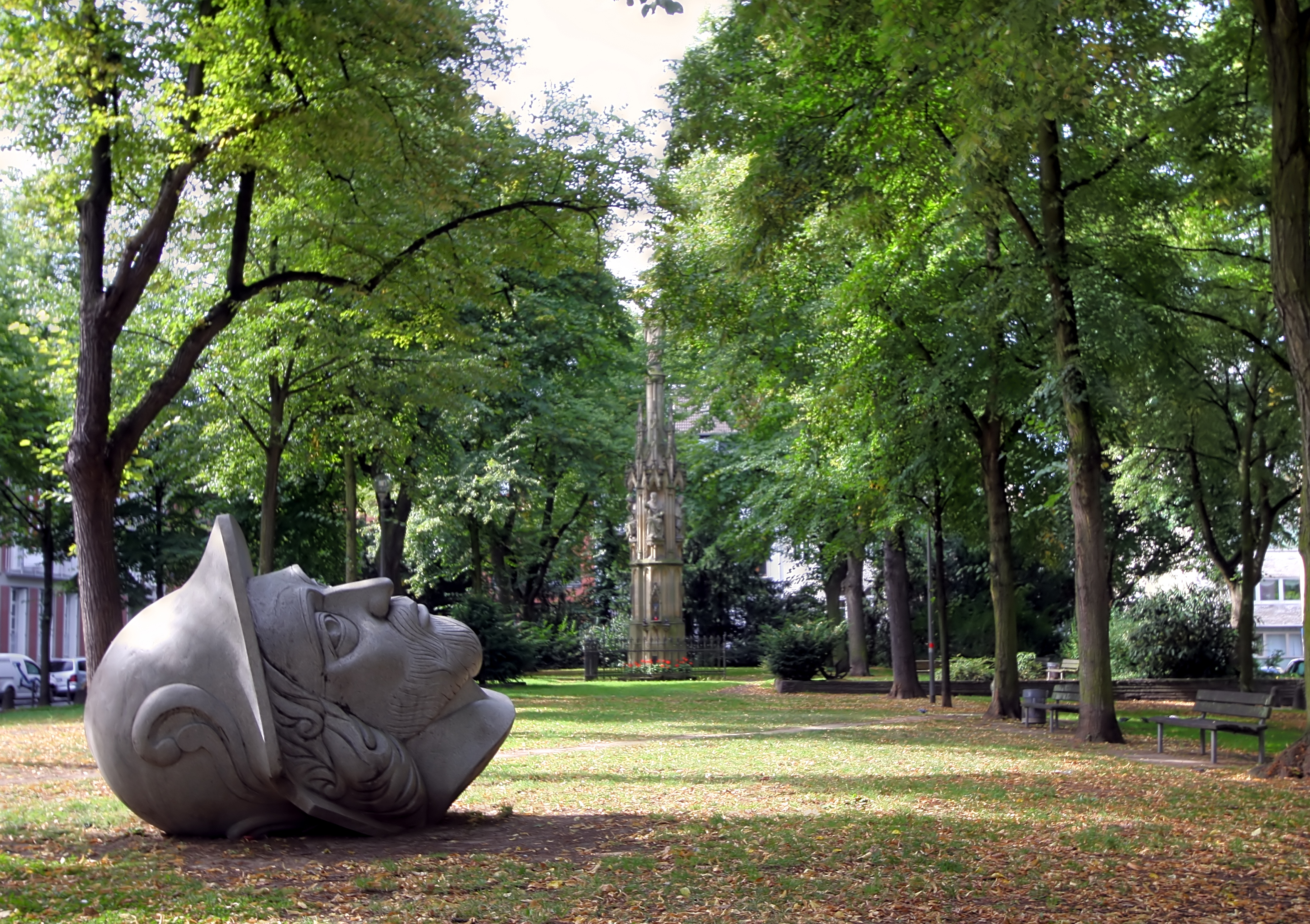 Kopf des Heiligen Gereons vor der Mariensäule, Gereonsdriesch, neben St. Gereon in Köln. Künstler des Kopfes: Iskender Yediler